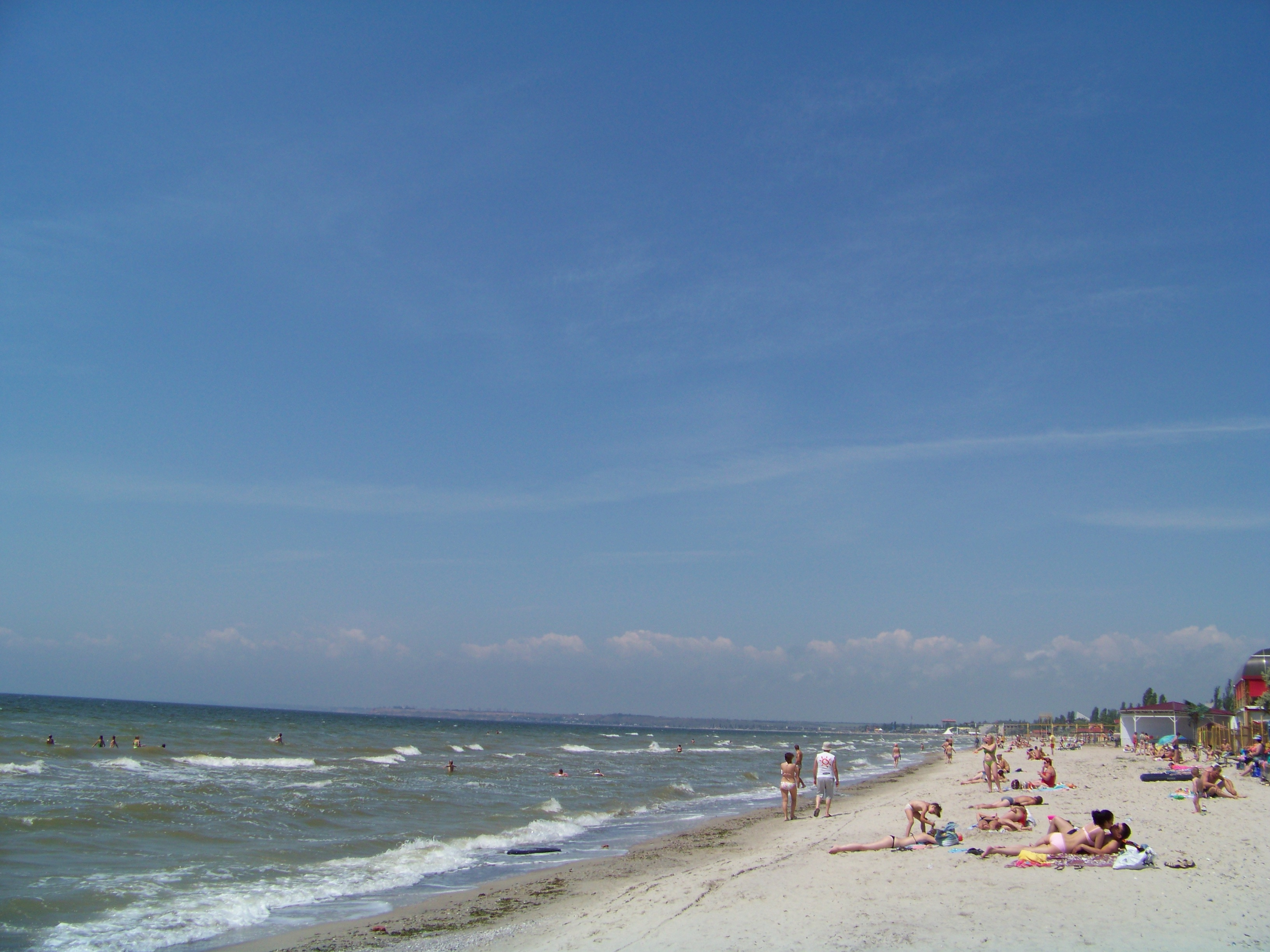 Пляж. Случайная фотография.